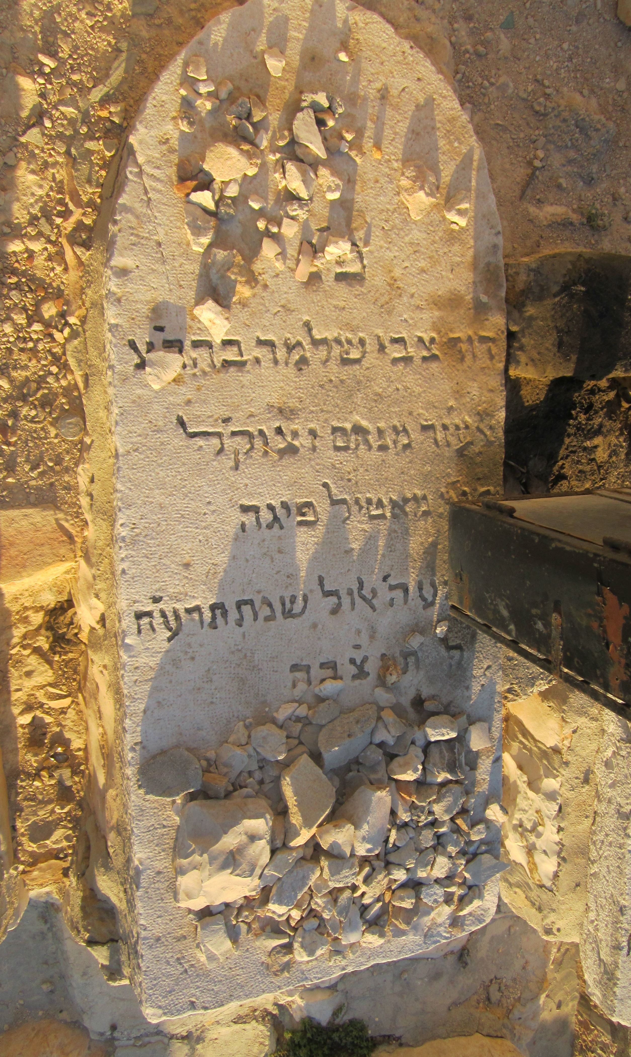 קבר רבי דוד צבי שלמה בר אלעזר מנחם מנדל מלעלוב בהר הזיתים